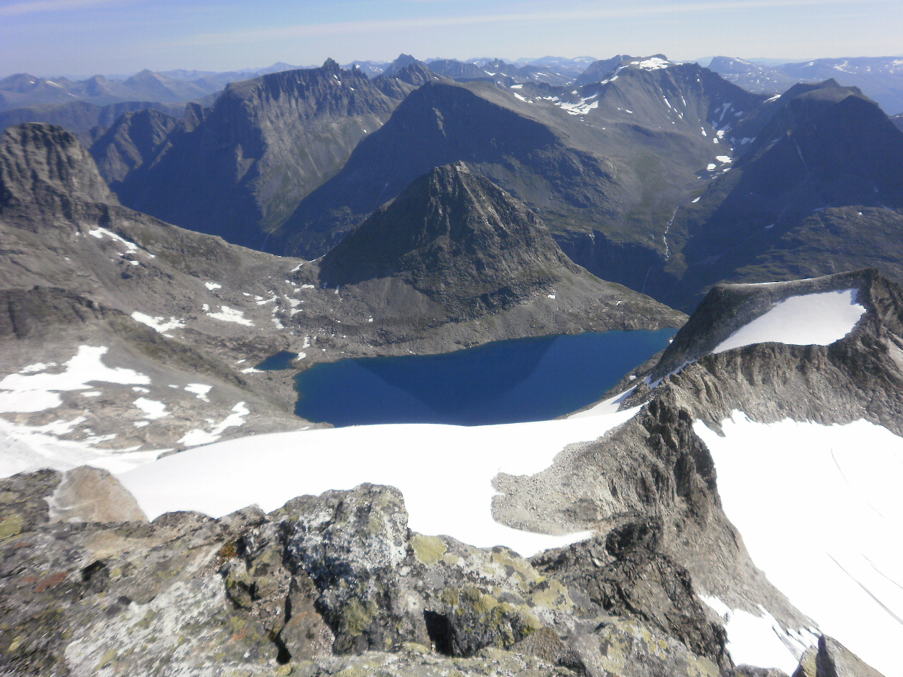 Fjell i Noreg